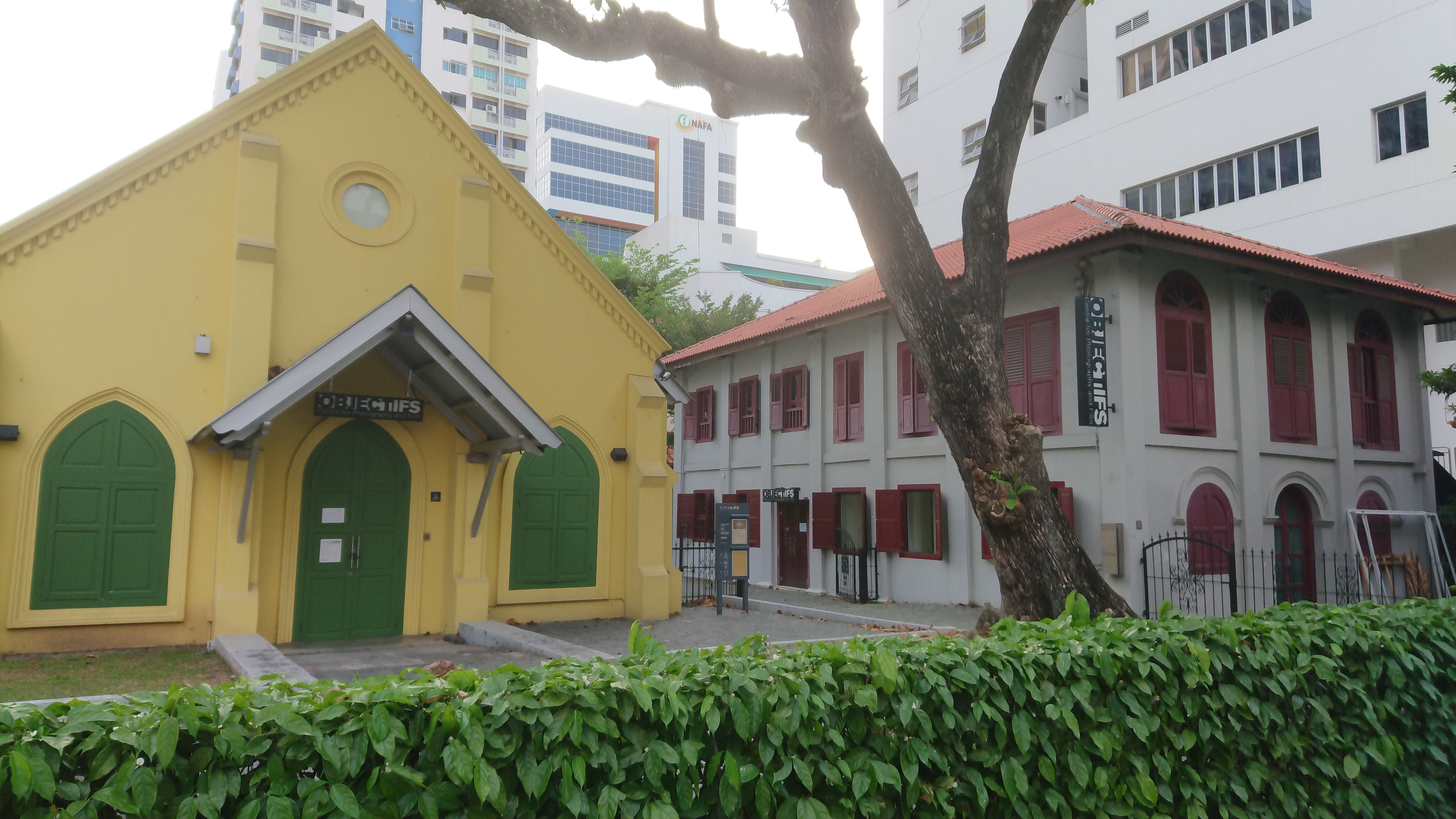 博物馆